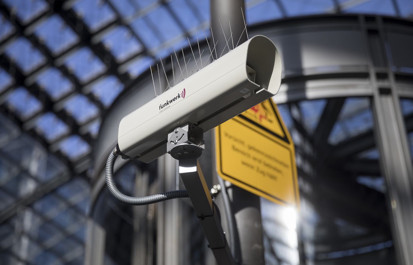 Überwachungssystem der Funkwerk video systeme GmbH